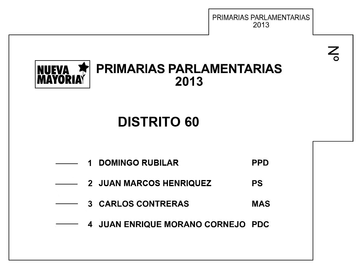 Facsímil del voto utilizado en las primarias parlamentarias del pacto chileno Nueva Mayoría el 4 de agosto de 2013, correspondiente al distrito 60 (Región de Magallanes).